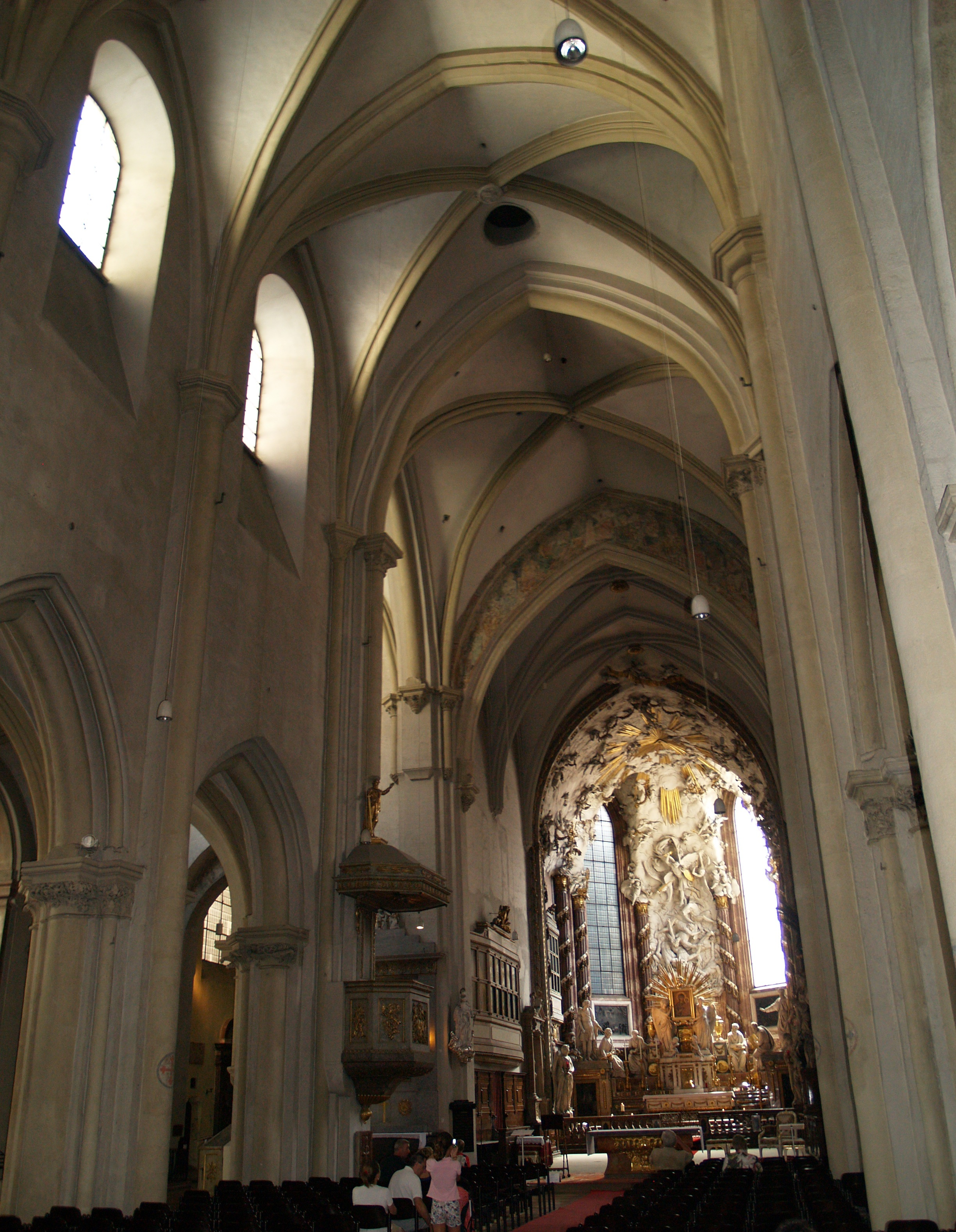 Viena. Iglesia de San Miguel. Nave central.